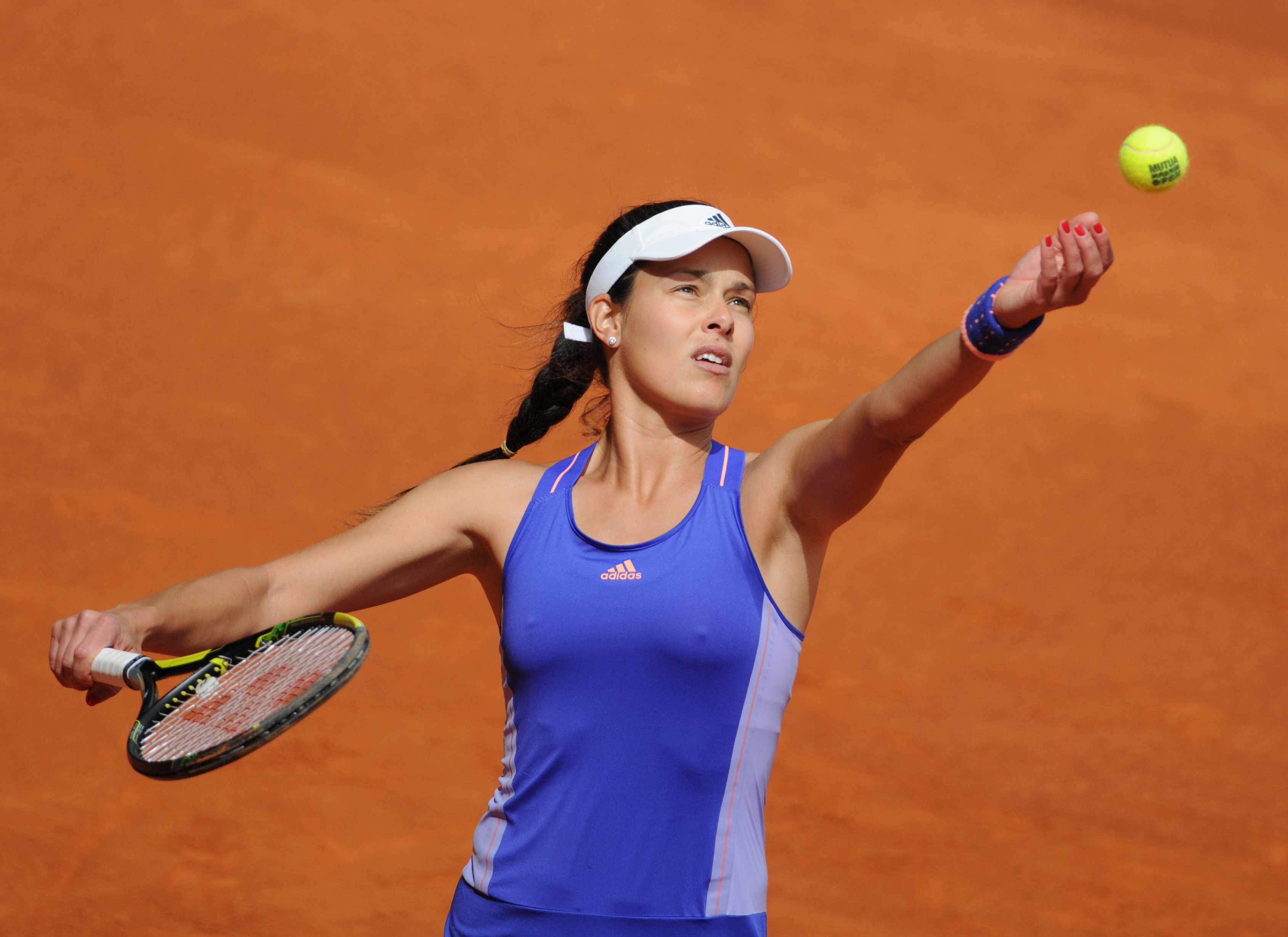 Ana Ivanovic